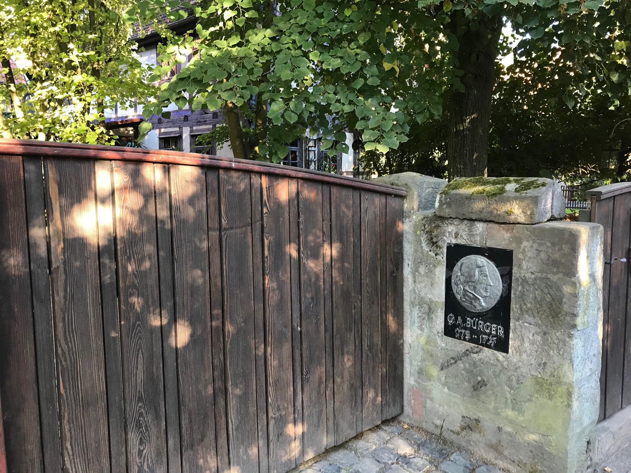 Wohnhaus Gotfried August Bürgers in Wöllmarshausen, September 2018